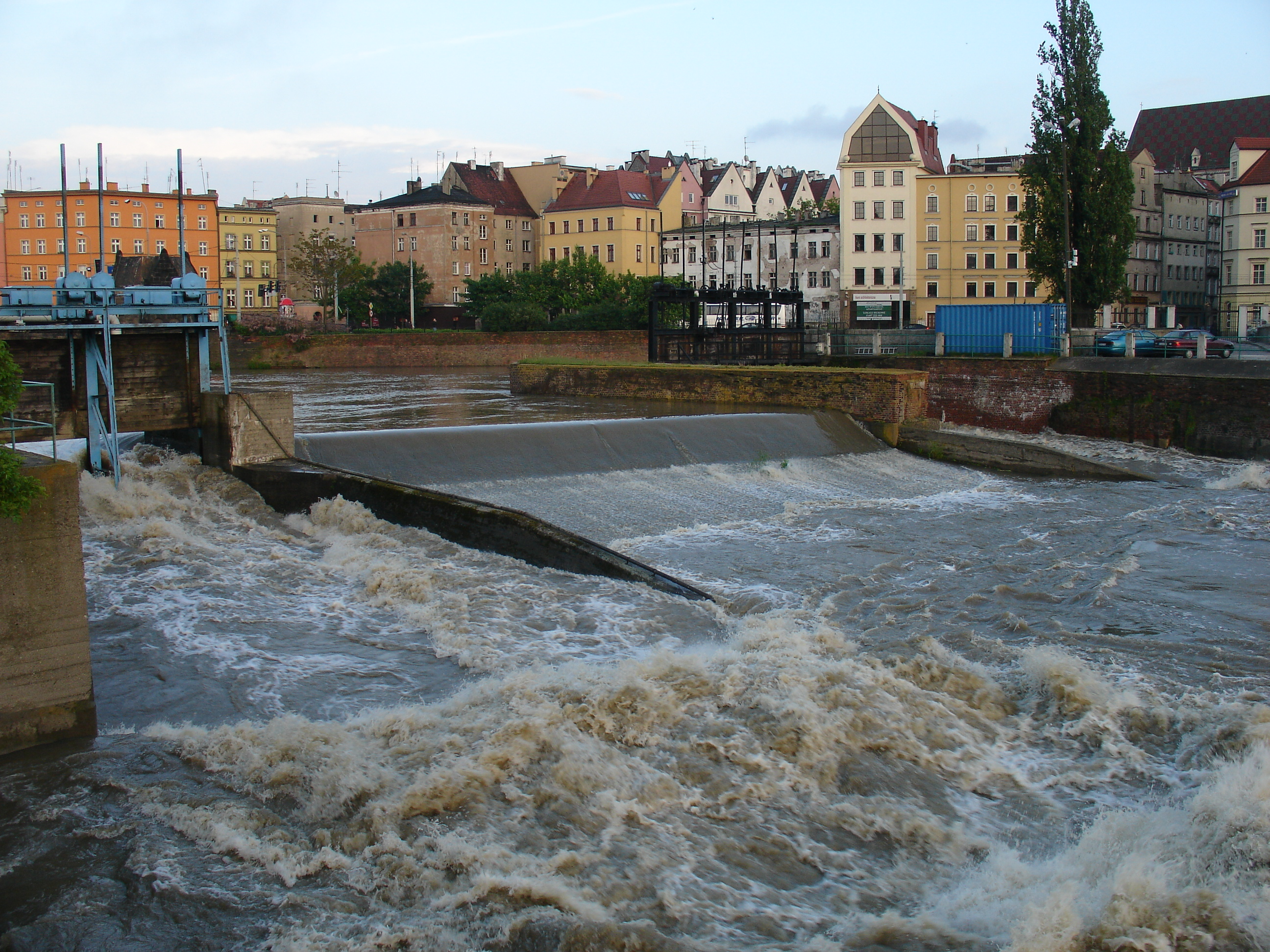 Odra na południowej elektrowni wodnej we Wrocławiu, piątek 21-05-2010, wieczór